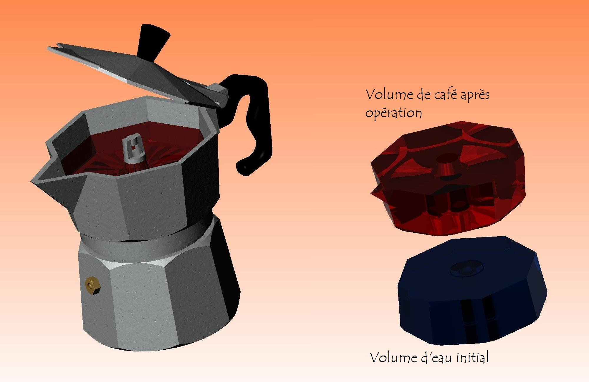 Image de synthèse réalisée sous SolidWorks avec le moteur de rendu Photoworks. Le réglage dans l'assemblage des dimensions de la cuve et de la verseuse permet d'atteindre l'égalite des volumes d'eau et de café. Les pièces réalisées dans l'assemblages ont des cotes, ou des formes automatiquement liées.